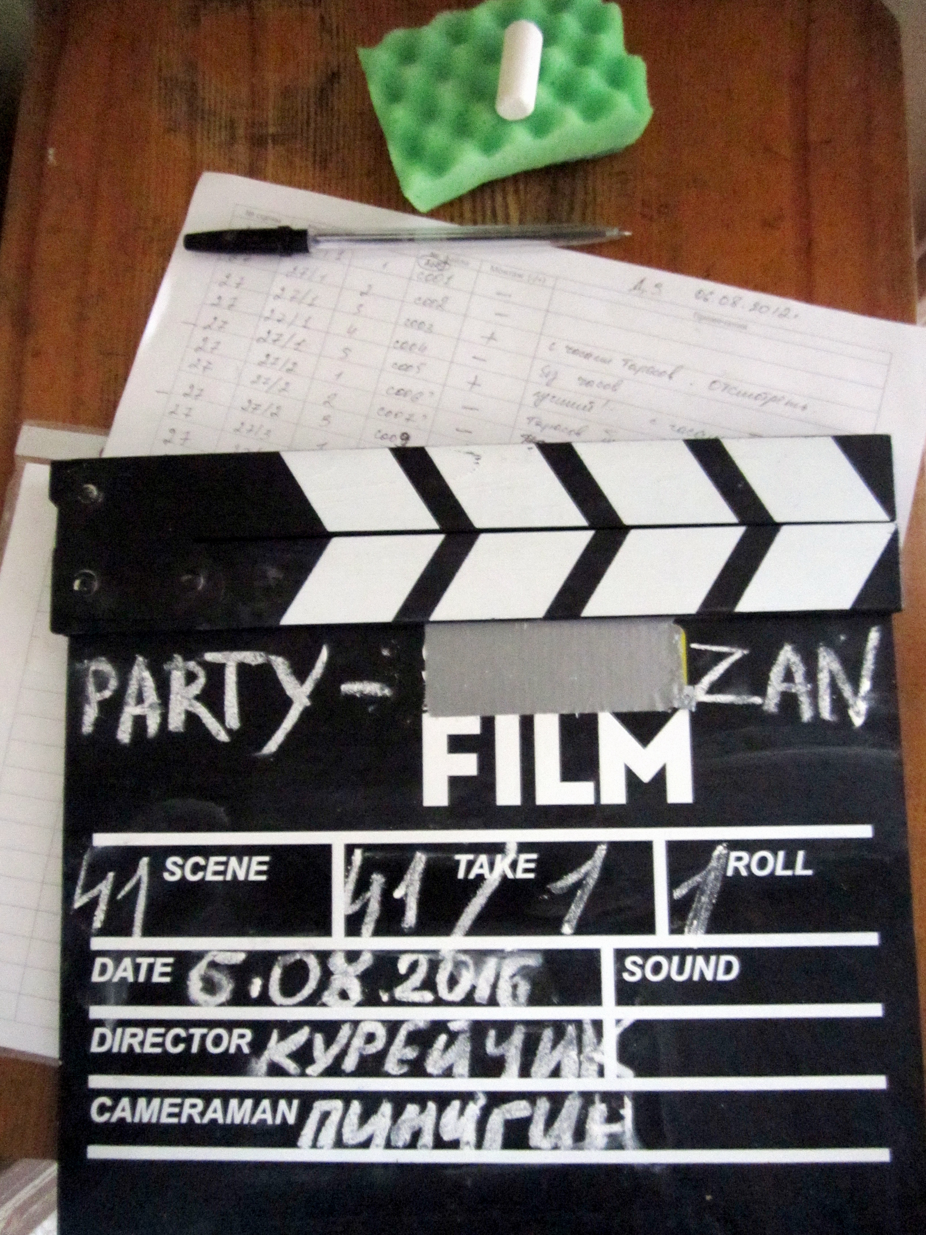 Хлопушка к фильму "PARTY-zan фильм"